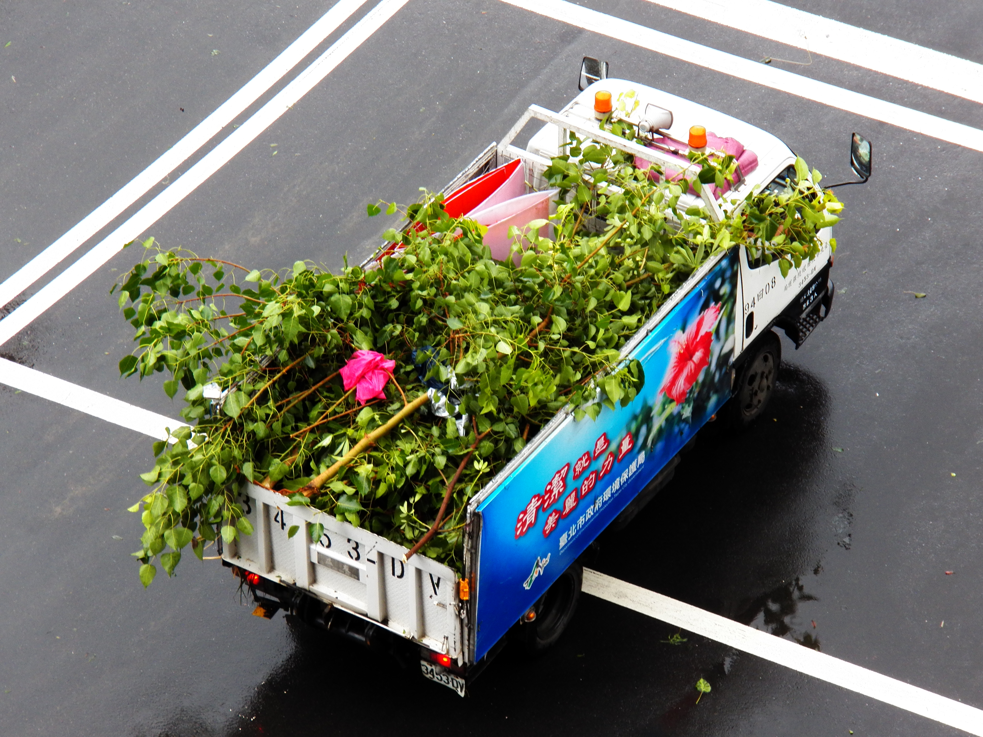 蘇拉颱風來襲期間，臺北市政府環境保護局載運殘枝落葉的三菱堅達資源回收車3453-DV，行駛於臺北市松山區民生東路。